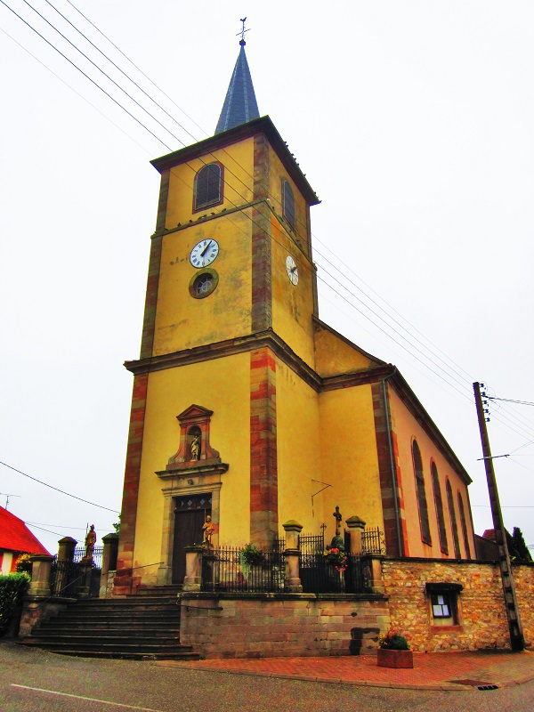 Eglise Mittersheim